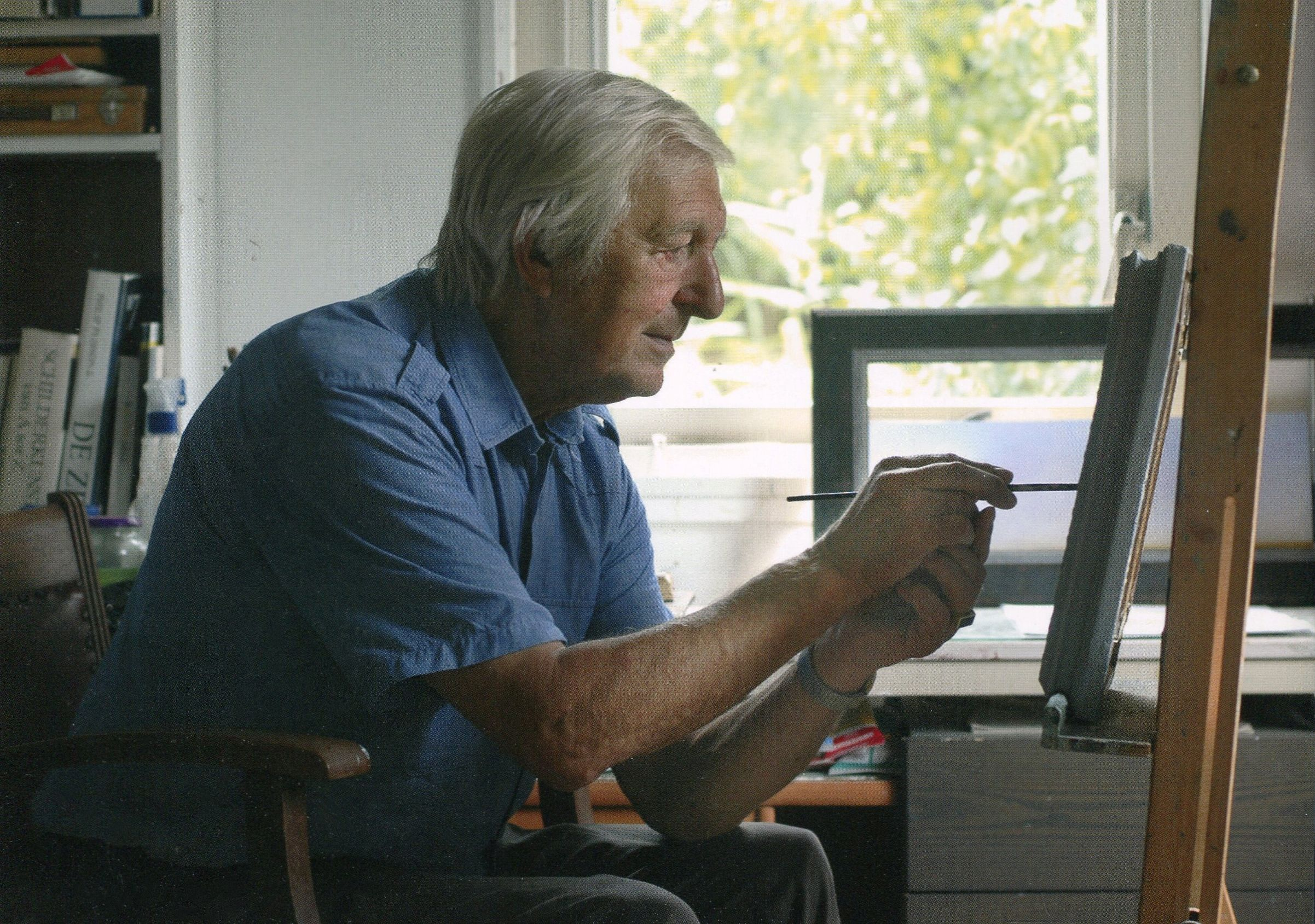 Minne Onnes aan het werk in zijn atelier